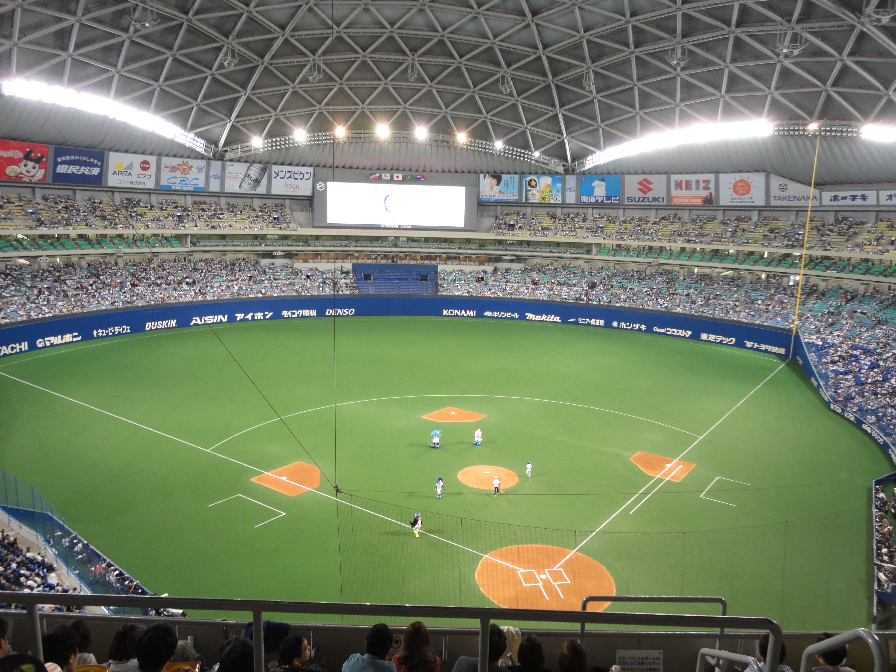 ナゴヤドーム